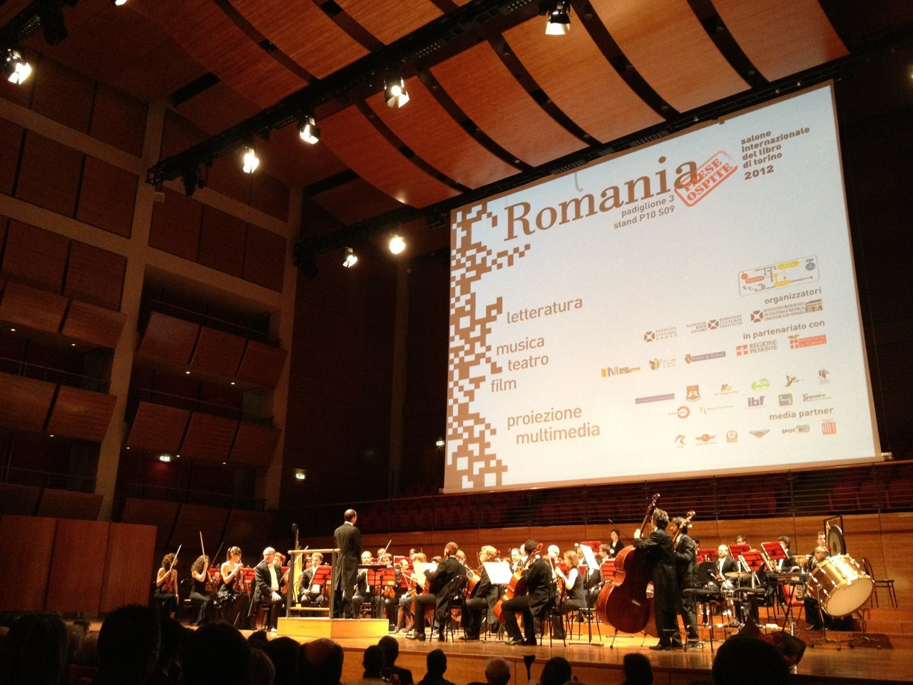 Il concerto di gala del Salone 2012.